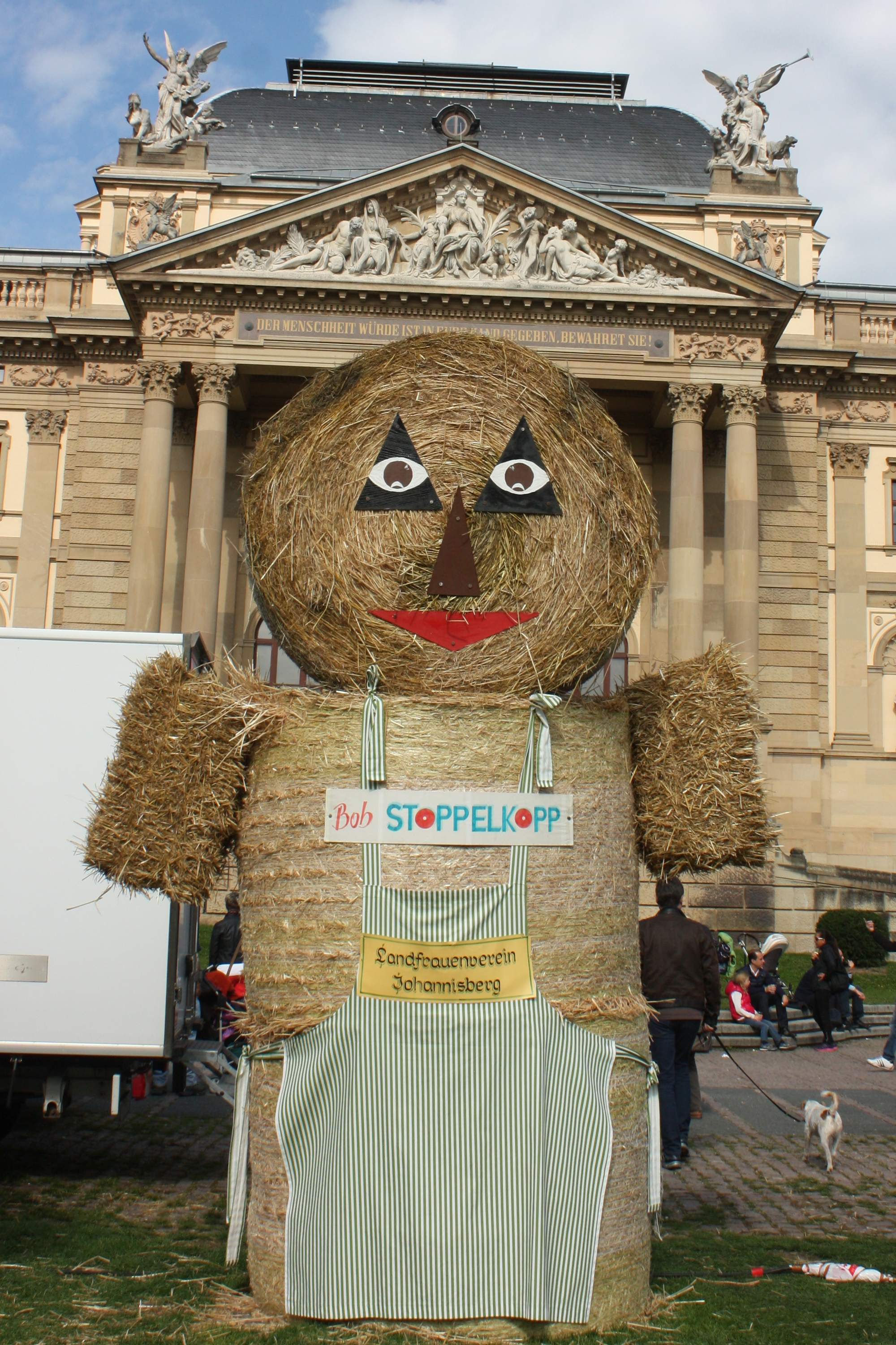 Wiesbadener Stadtfest 2013: Impressionen vom Herbstmarkt